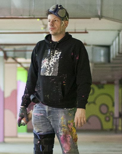 Graffiti artist - Croatia